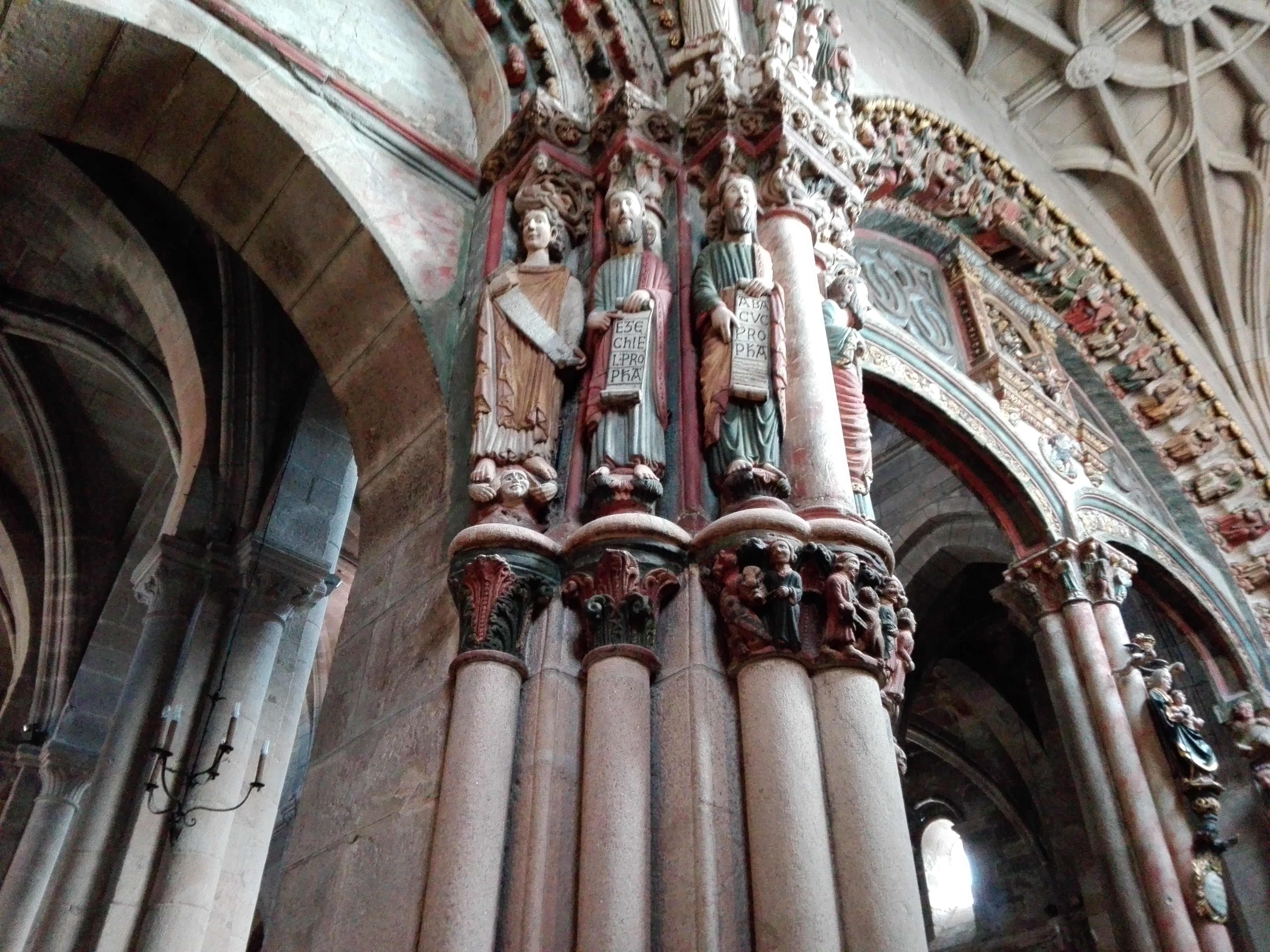 Pórtico del Paraíso